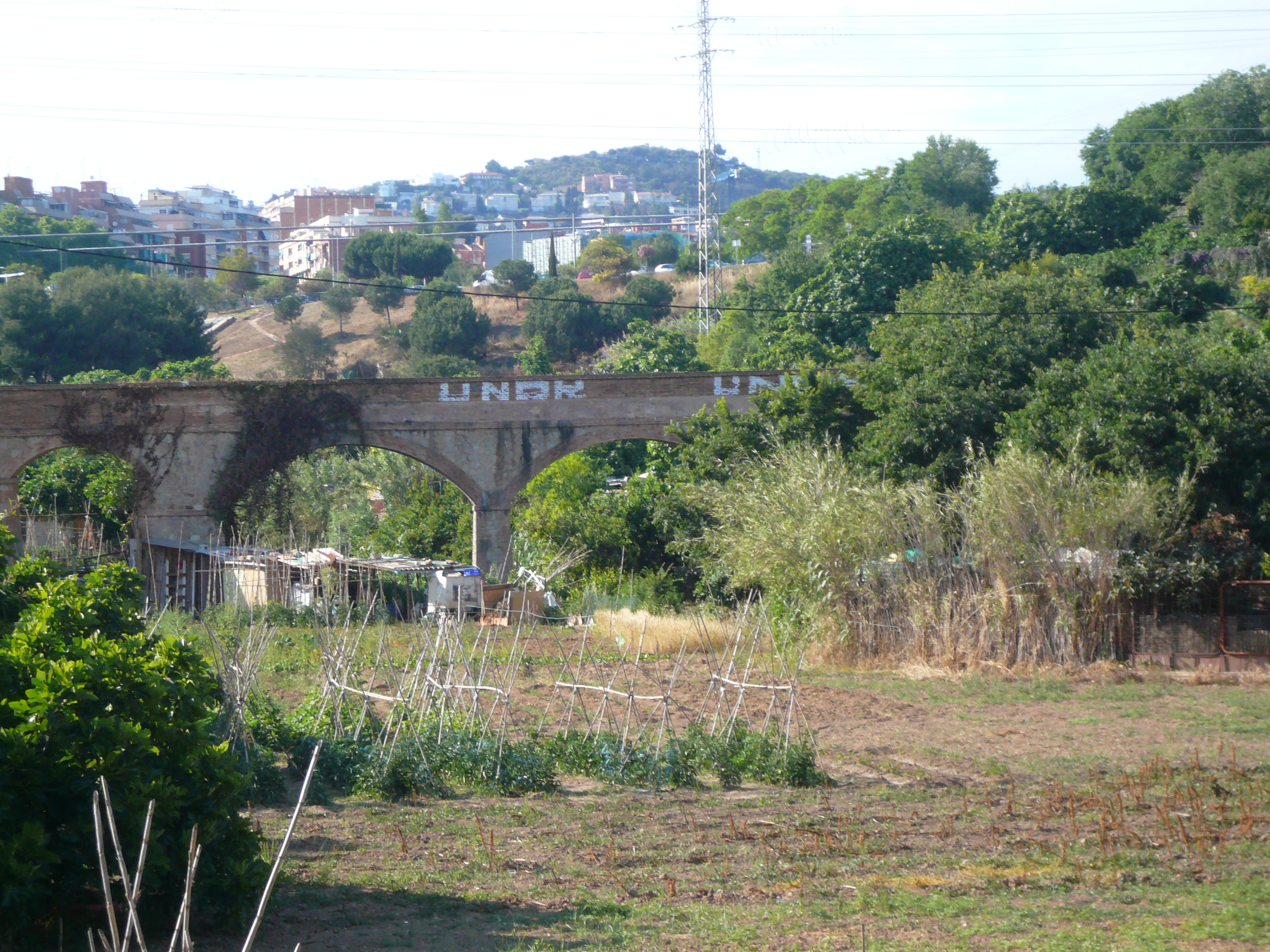 Aqüeducte sobre el torrent de Can Clota. Torrent de Can Clota (Esplugues de Llobregat). Object location41° 22′ 11.11″ N, 2° 05′ 42.93″ E